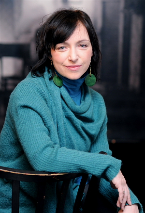 Tatiana Vilhelmová (nar. 1978) je česká herečka.